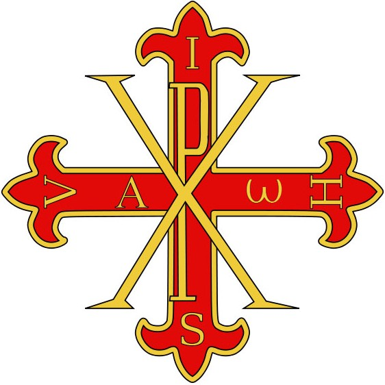 Croix constantinien svg